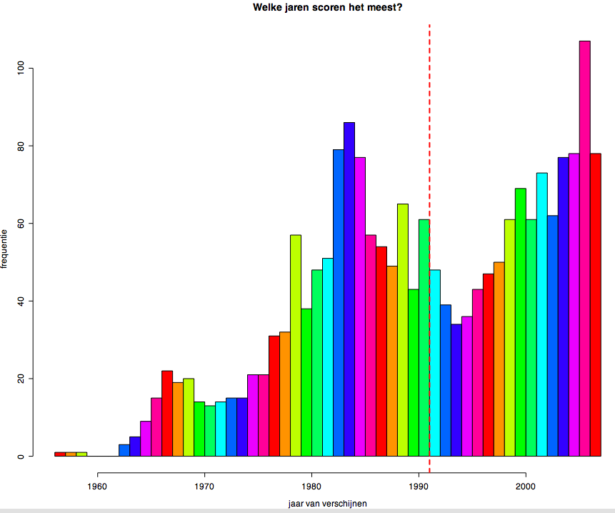 Donna's_top_2000